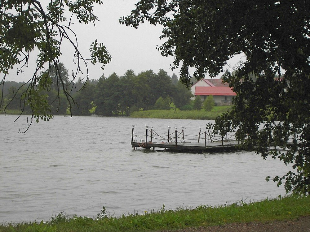 Nad jeziorem Harsz